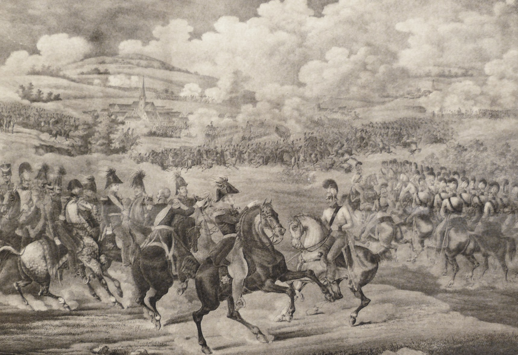 Bitwa pod Kulm (miedzioryt) - Muzeum w Sierakowie.